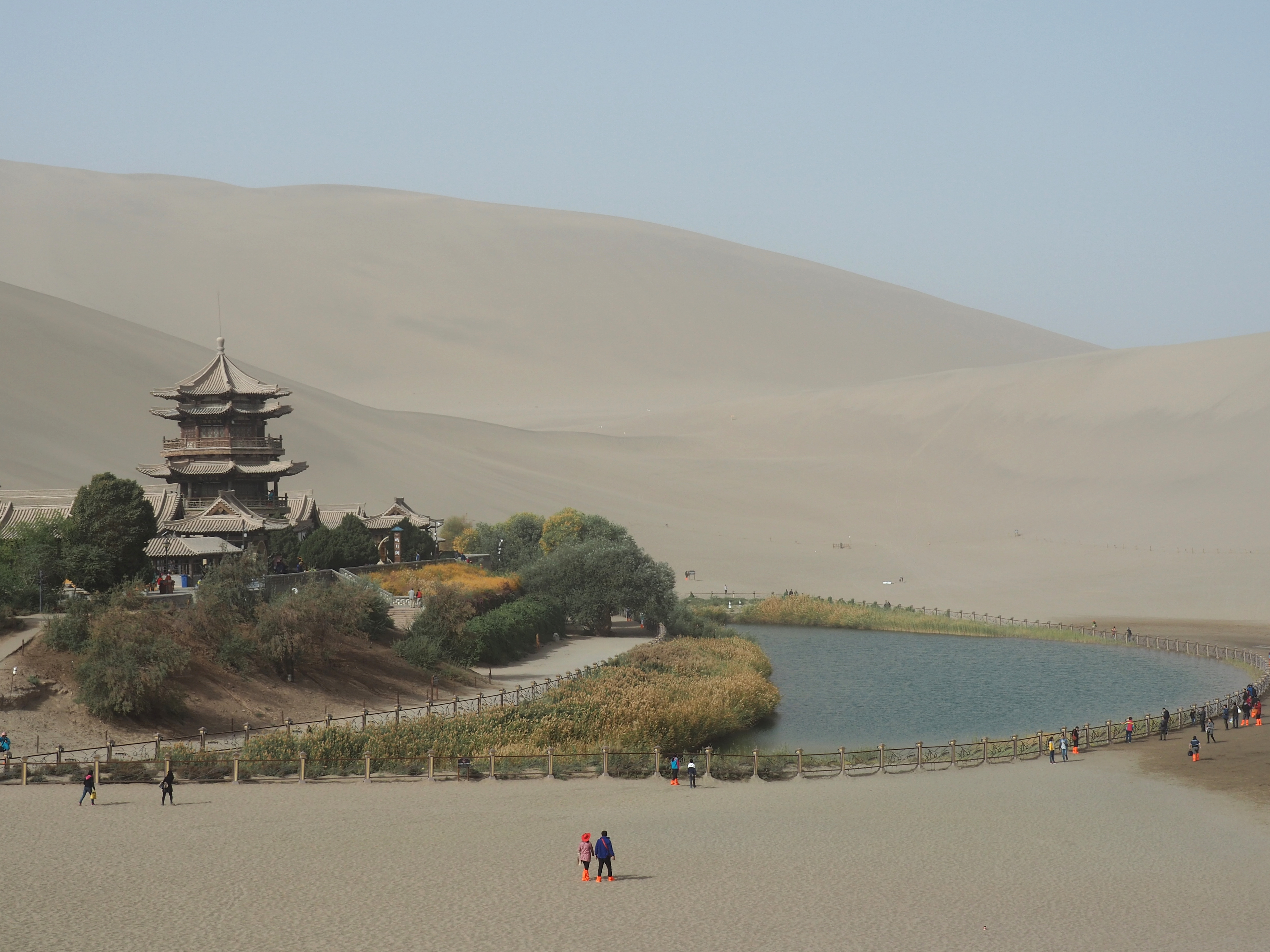 Crescent Moon Lake